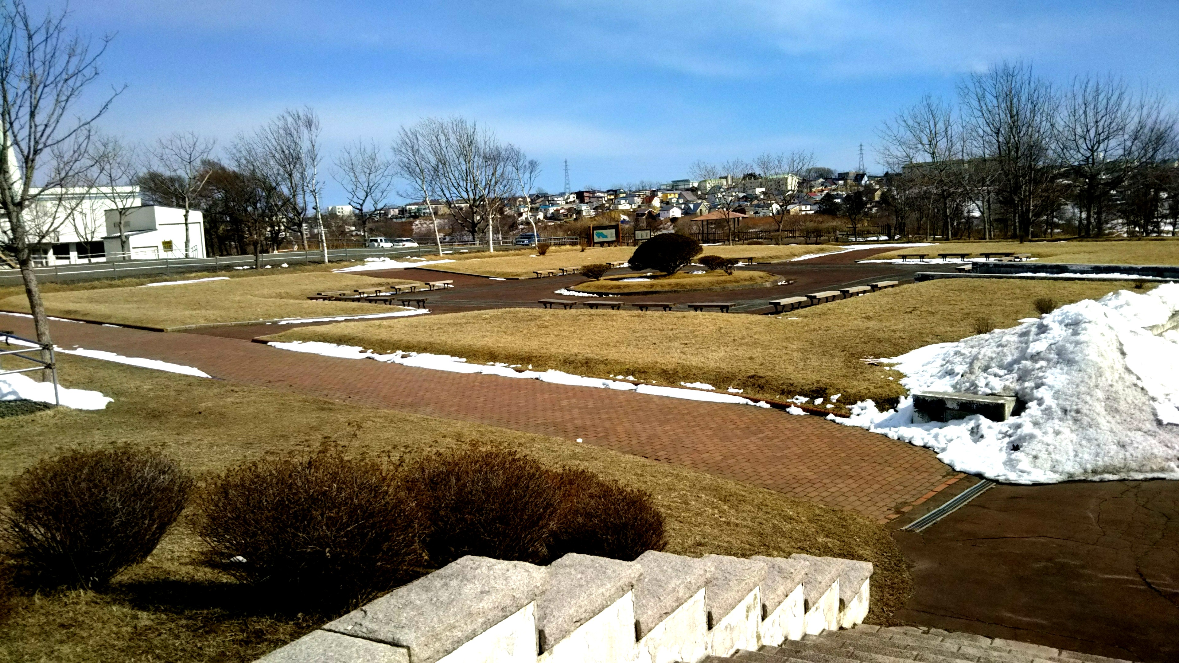 春採公園を2019年3月に撮影した写真